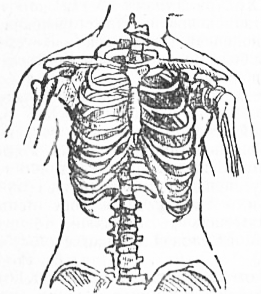 Нормальная женская грудная клетка.